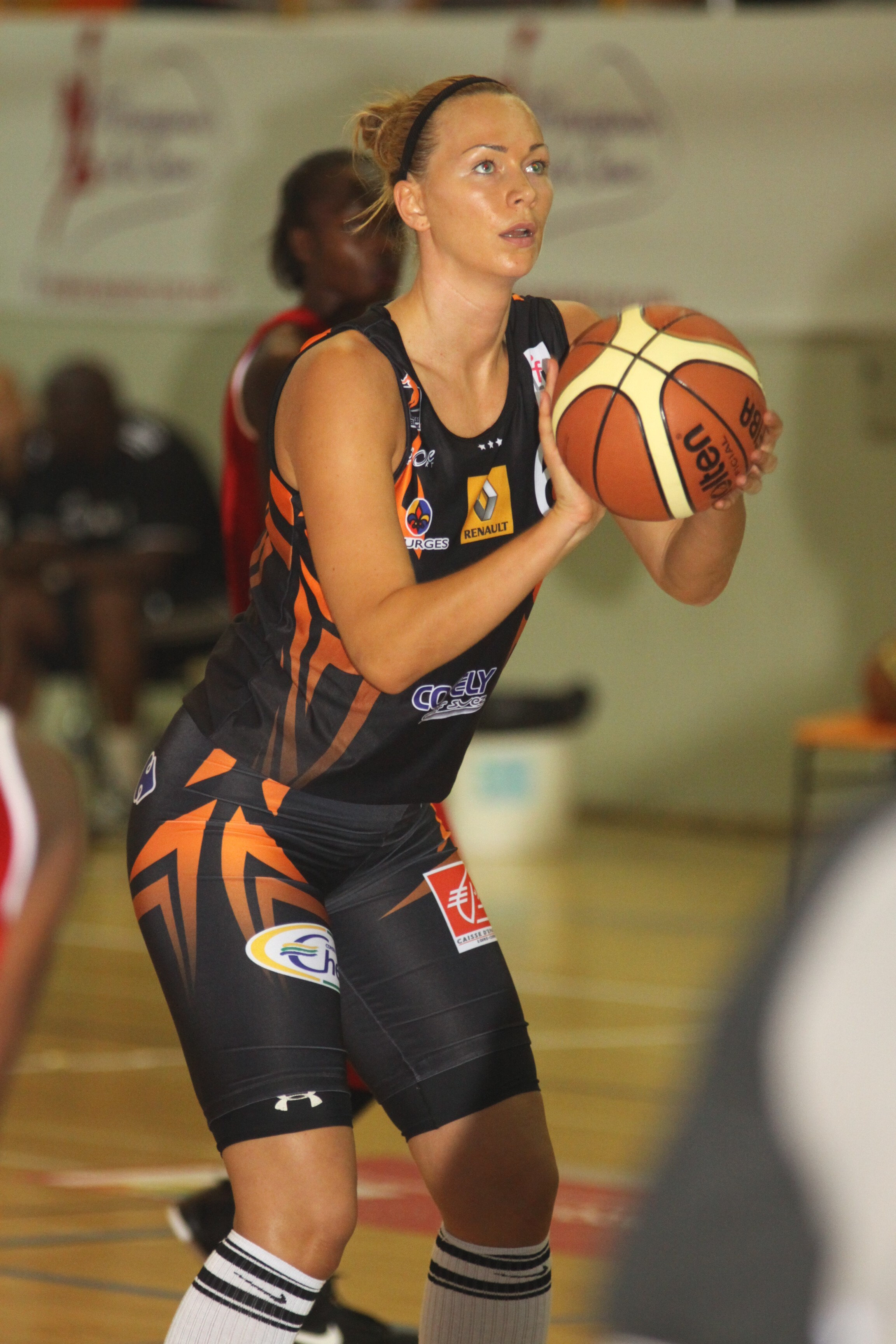 10 sept 2011